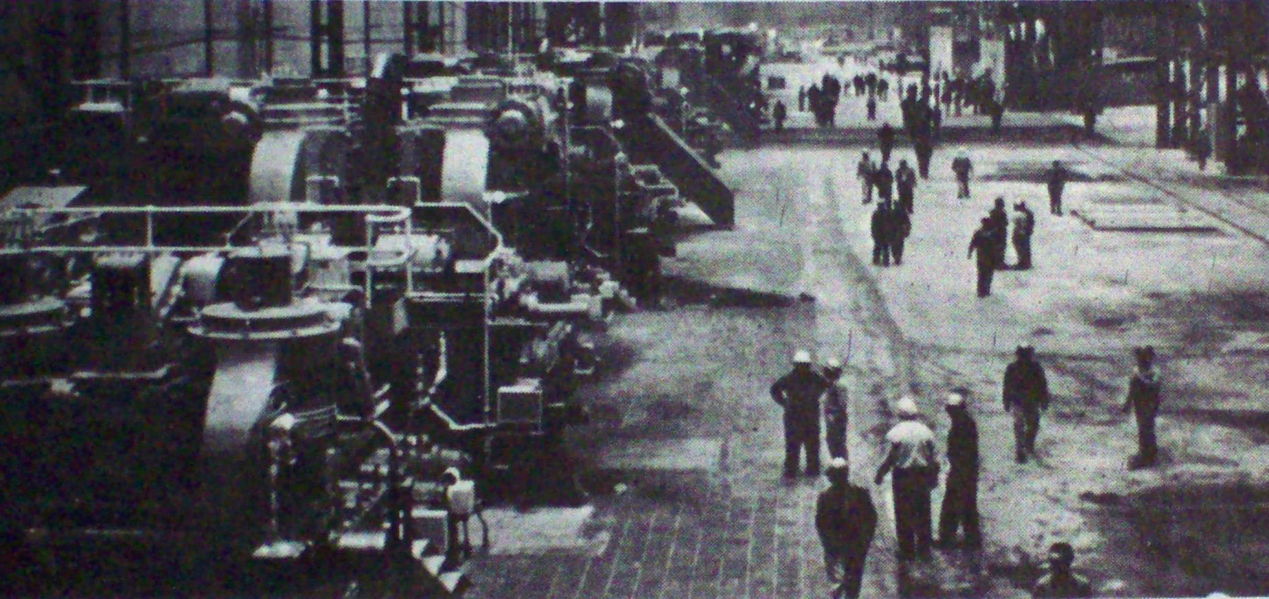 Es una foto del laminador de chapas en caliente, un modelo único en Sudamerica, ejemplo de la industrialización que gozo el país durante el periodo de 1958 a 1962.